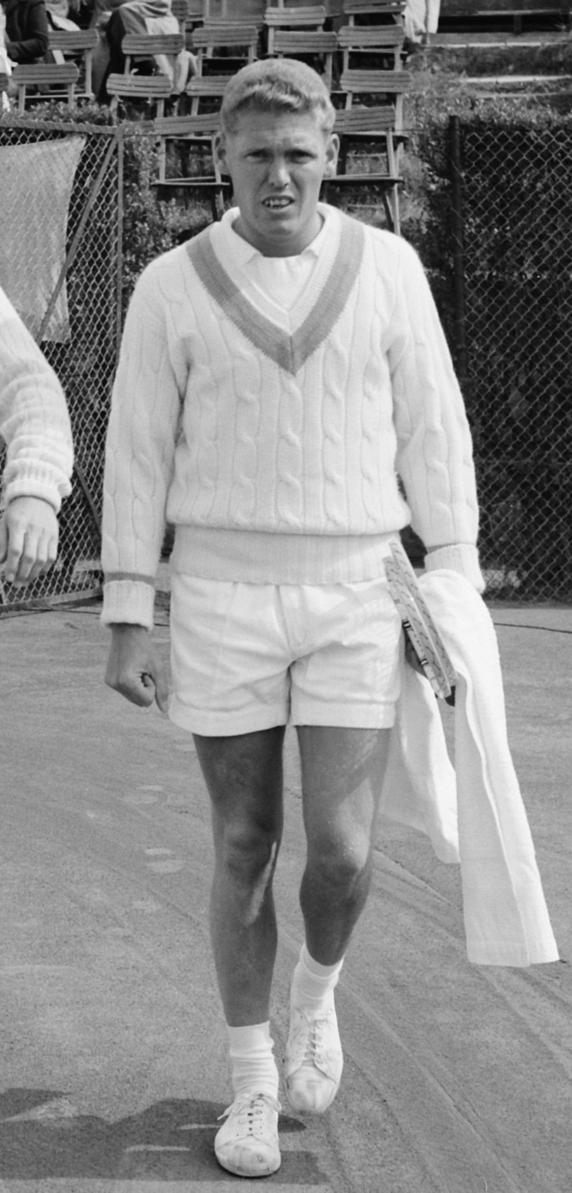 Tennis Noordwijk, Fred Dehnert